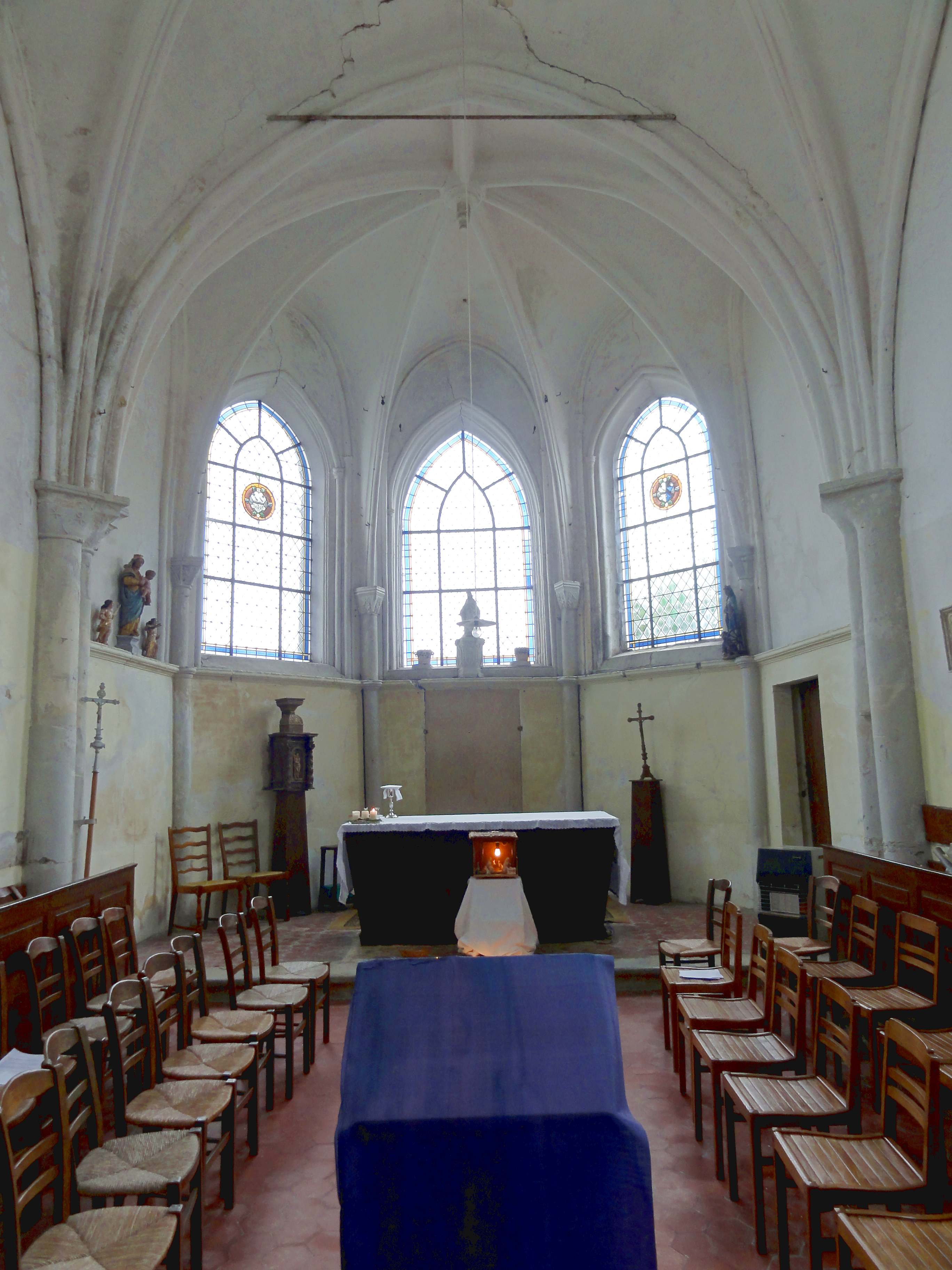 Intérieur de l'église - voir titre.